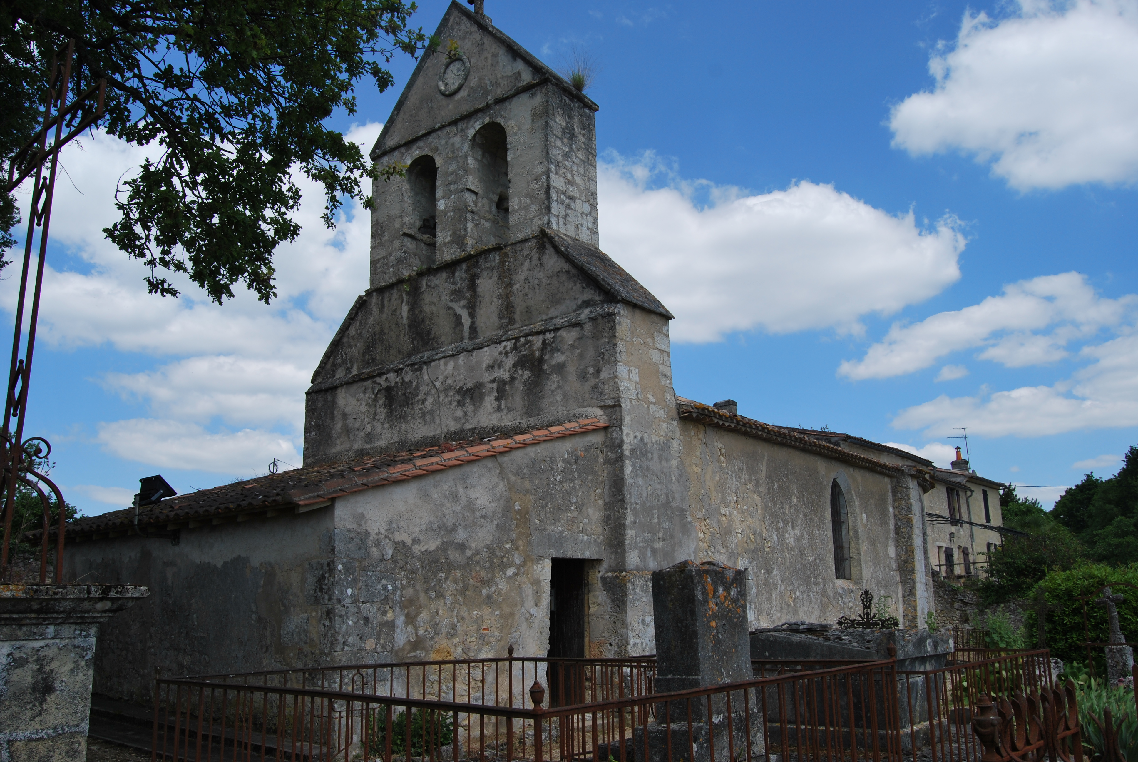 Eglise Saint-Pantaléon de Meyna